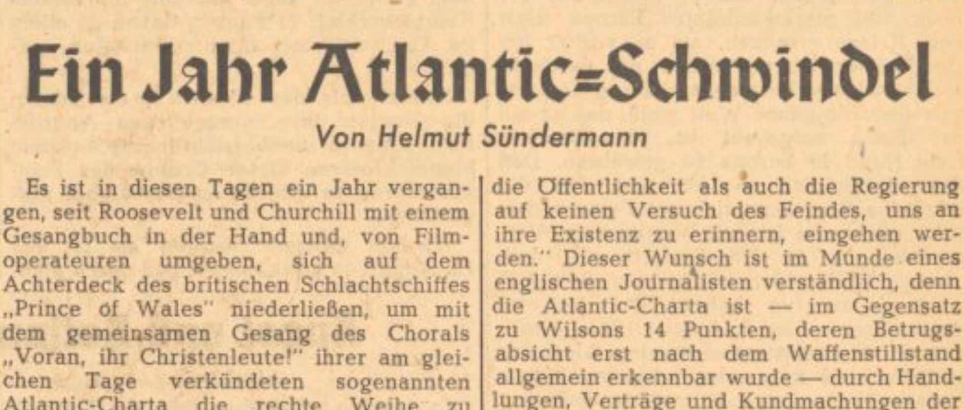 Ein Jahr Atlantik-Schwindel — Artikel von Helmut Sündermann 1942 in der NS-Zeitung Völkischer Beobachter